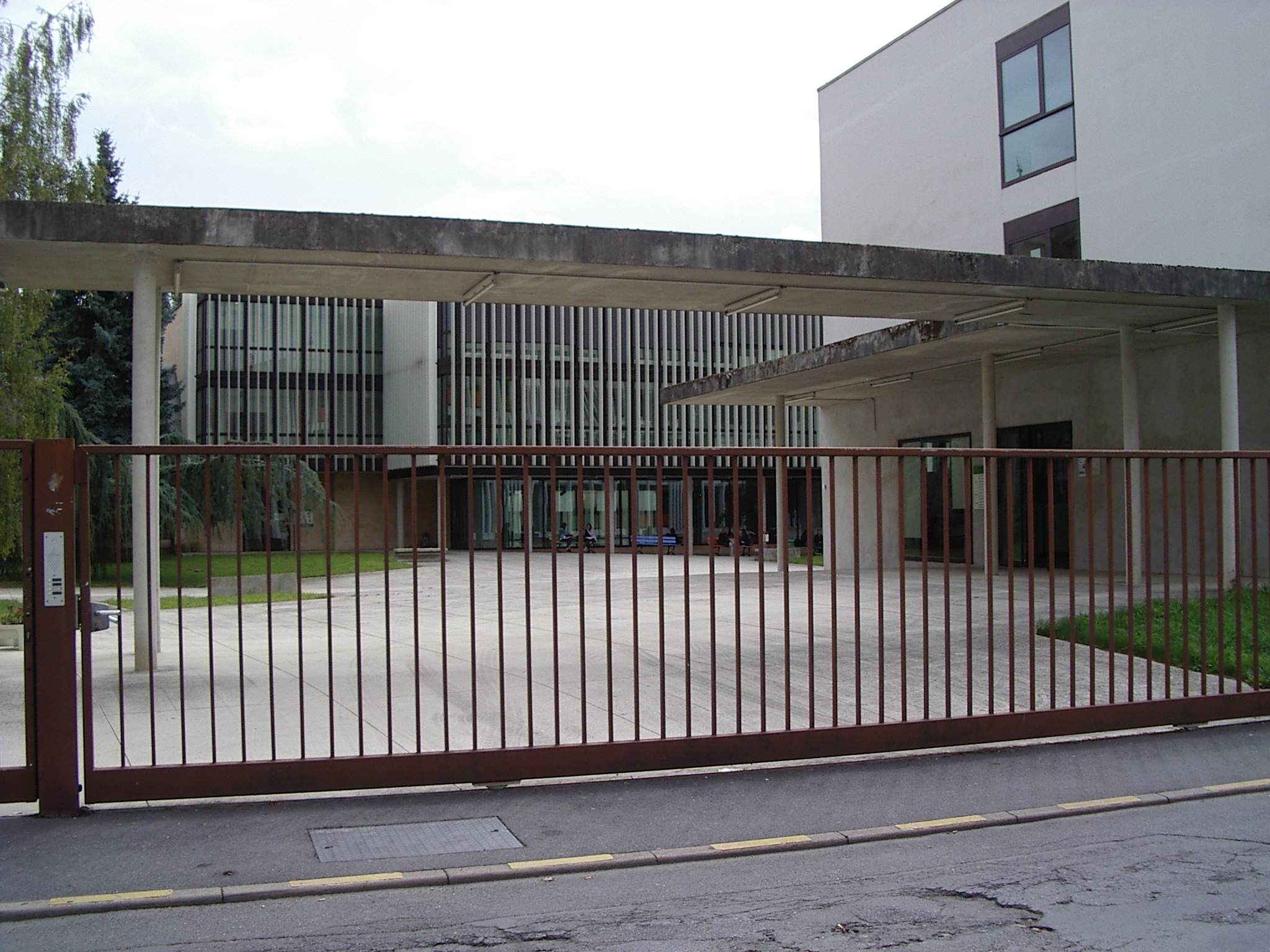 Lycée Sévigné Charleville (Ardennes)